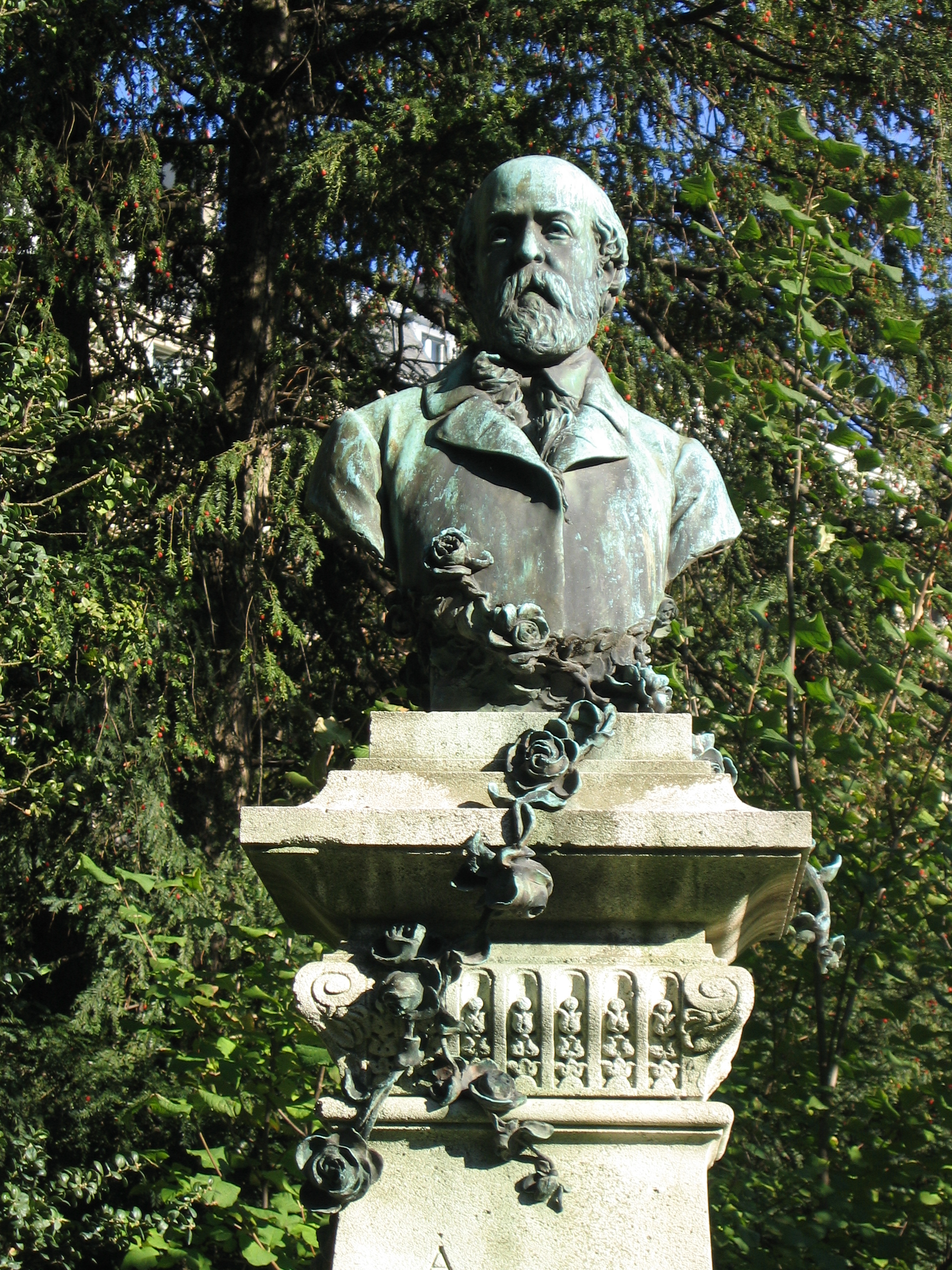 Henri Théophile Bouillon (Français, 1864-1934) [1], Georges Debrie architecte, Monument à Henry Murger (1822-1861), 1895, détail, bronze, Paris, jardin du Luxembourg[1]. ↑ « Monument à Henri Murger – Paris, 6e arr. », notice sur